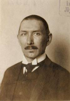 Ivan Lutskevich